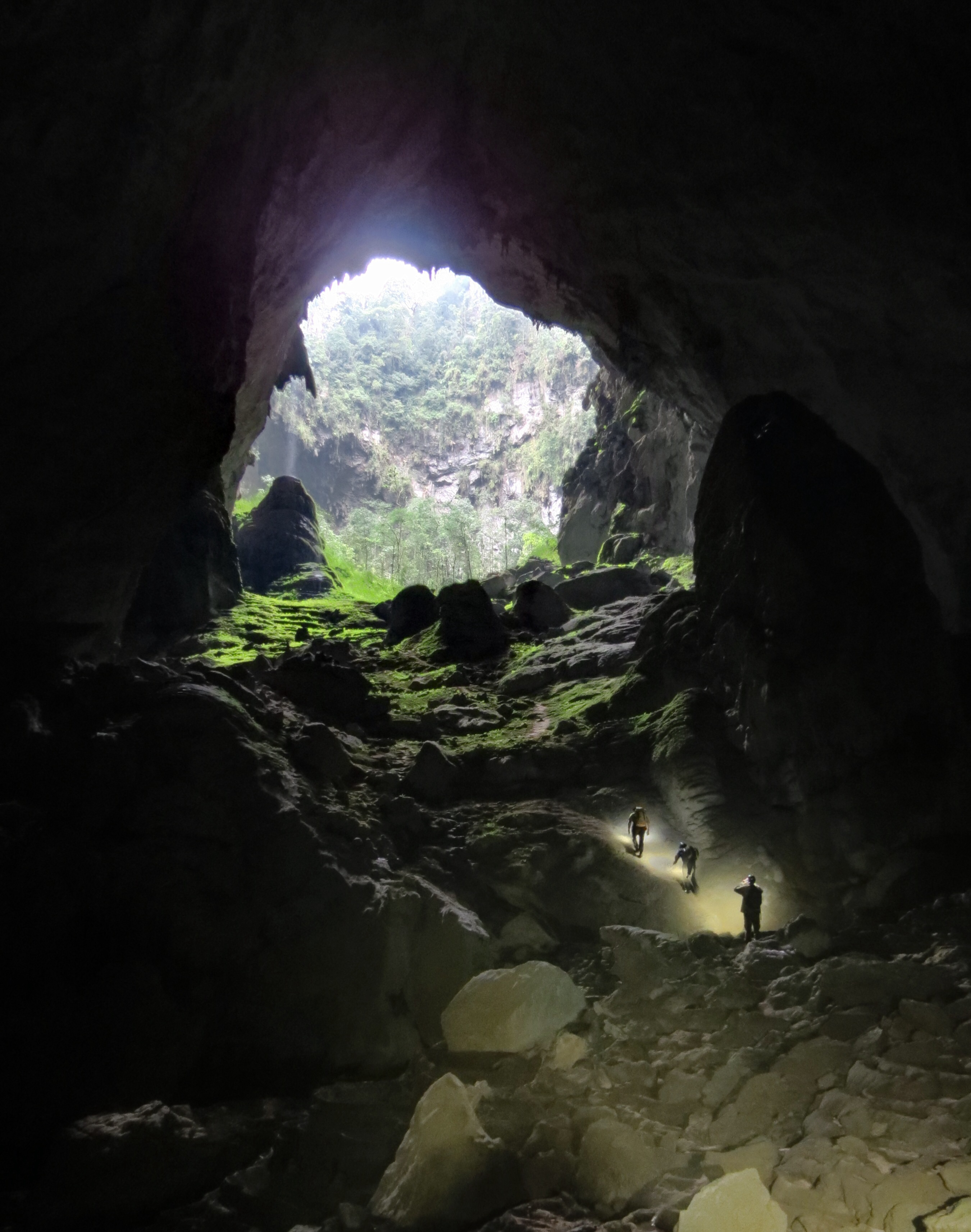 Son Doong-47